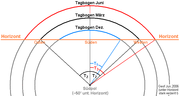 Tagbogen der Sonne im Winter, Früjahr und Sommer; schematisch für Mitteleuropa, Blick nach Süden. ANMERKUNG: wegen großem Blickwinkel (270°!) unterm Horizont stark verzerrt. So ist in natura die Strecke Osten-Südpol-Westen gleichlang wie direkt am Horizont.